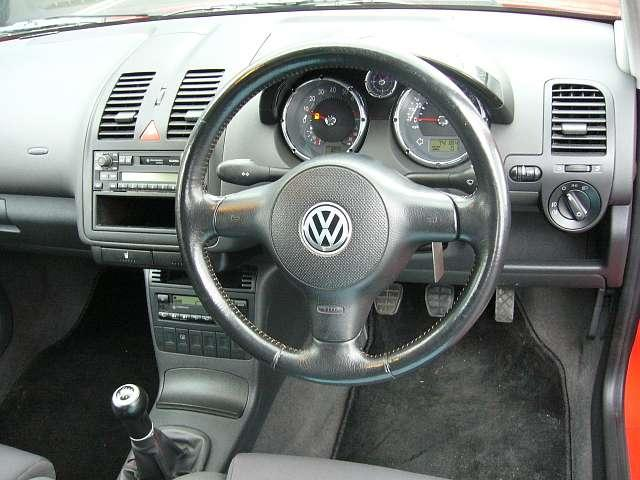 Instrumentpanel i VW Polo III 1.6 GTI Phase II, højrestyret